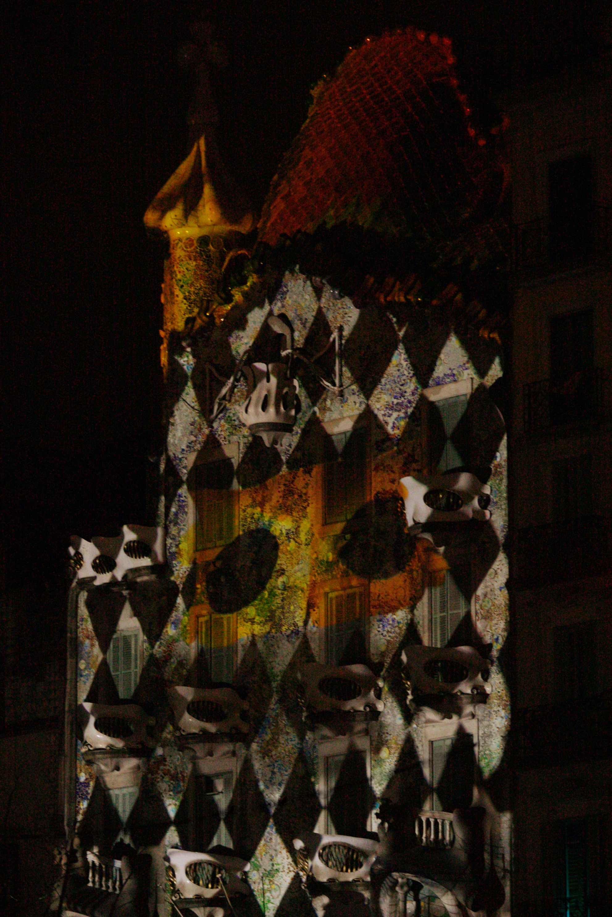 Casa Batlló decorada d'arlequí. Projecció en vídeo mapping en commemoració dels 10 anys de l'obertura al públic de la casa Batlló.